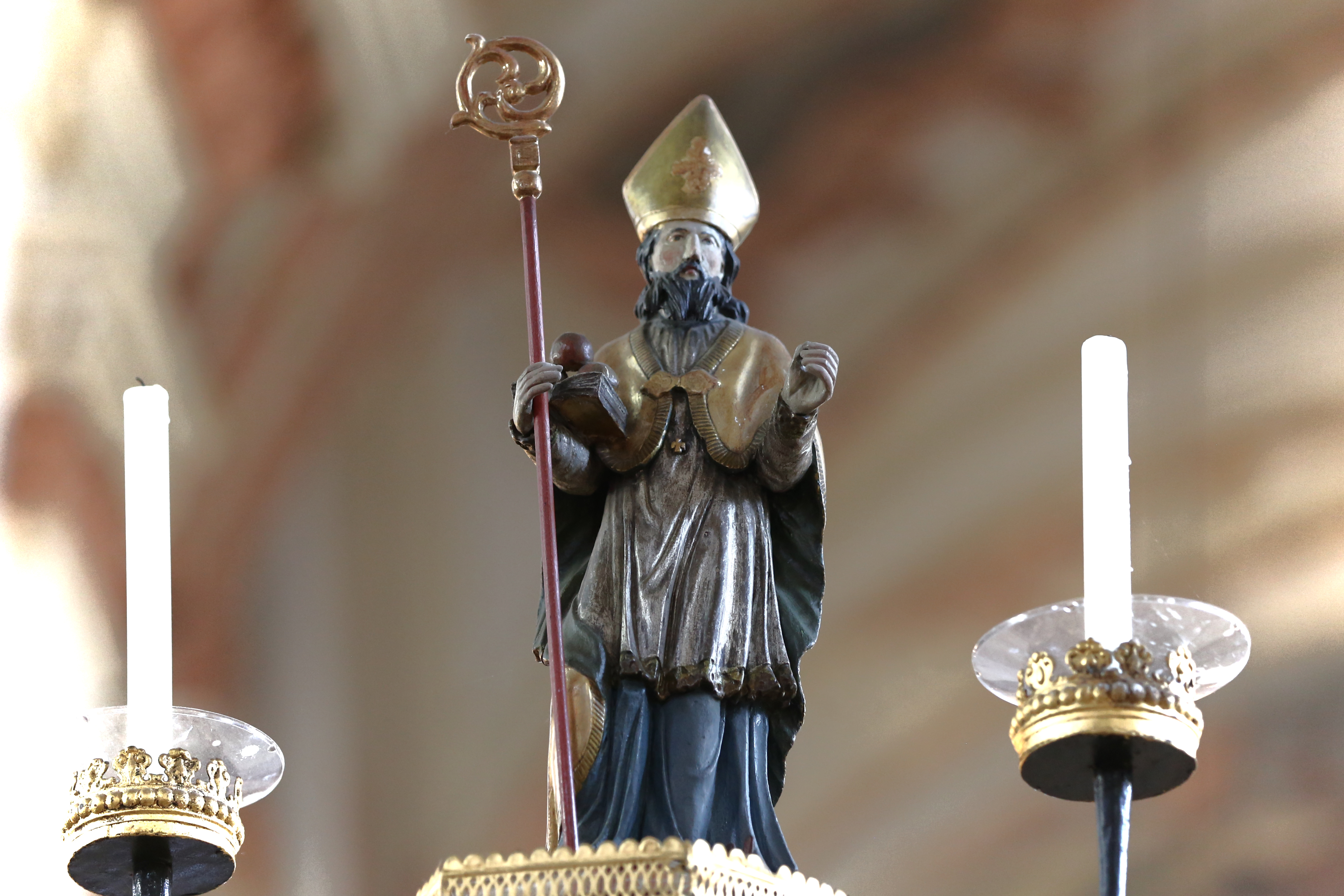 St. Maria Thalkirchen Zunftstange der Isarflößer mit dem Heiligen Nikolaus